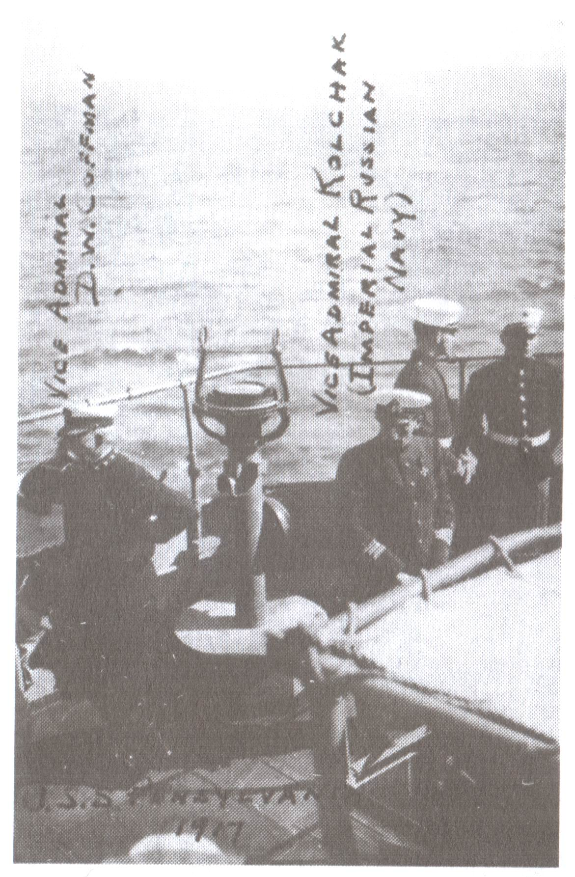 А.В. Колчак и американский адмирал Д. Коффман на палубе флагманского линкора "Пенсильвания". США. 1917